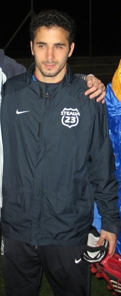 Rahamin 'Klemi' Saban